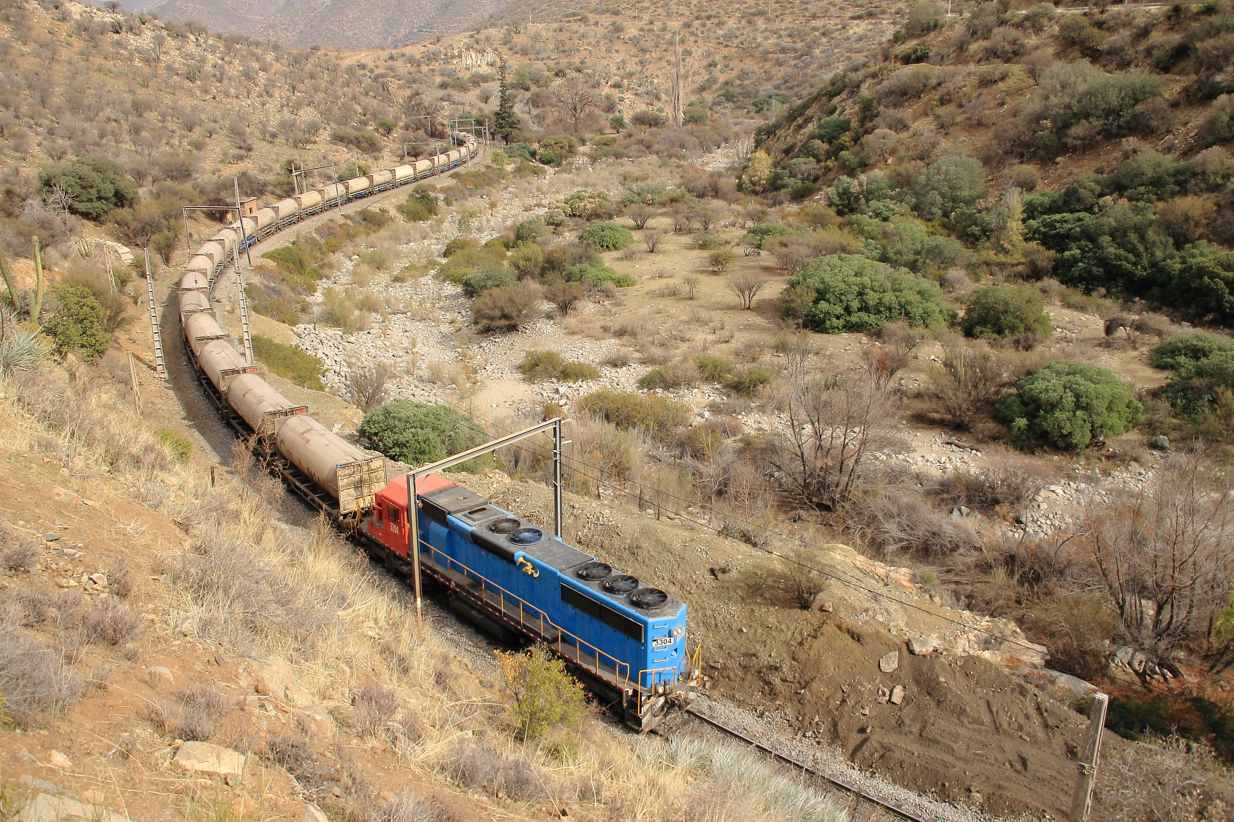 Condiciones climáticas extremas y la soledad absoluta, hacen de este tramo uno de mis preferiremos a la hora de hacer fotos a trenes de carga. Luego de caminar 8 kms, desde Til Til, la vista privilegiada, y el contacto directo con la naturaleza son mas que un merecido premio. En la foto, serpenteando por "el corte" la poderosa D3304 al mando del tren de la basura, con silos cargados hacia la Planta de Montenegro. KM 55 / "EL CORTE" via Alameda - Puerto